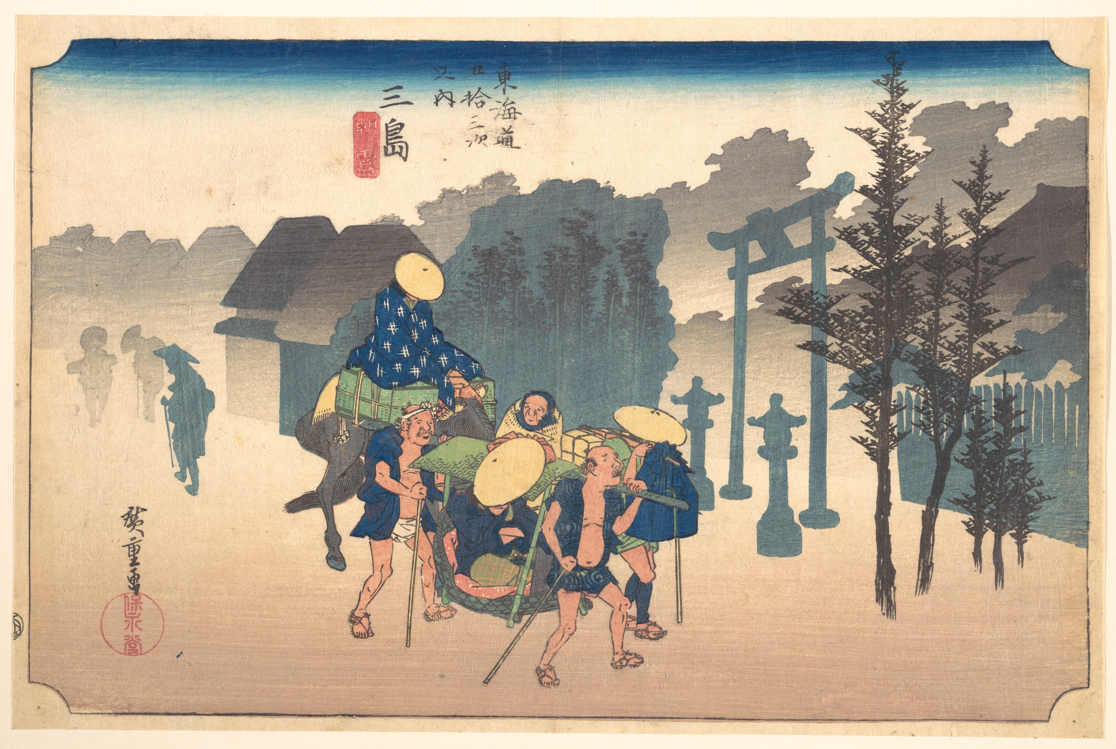 Japan; Print; Prints